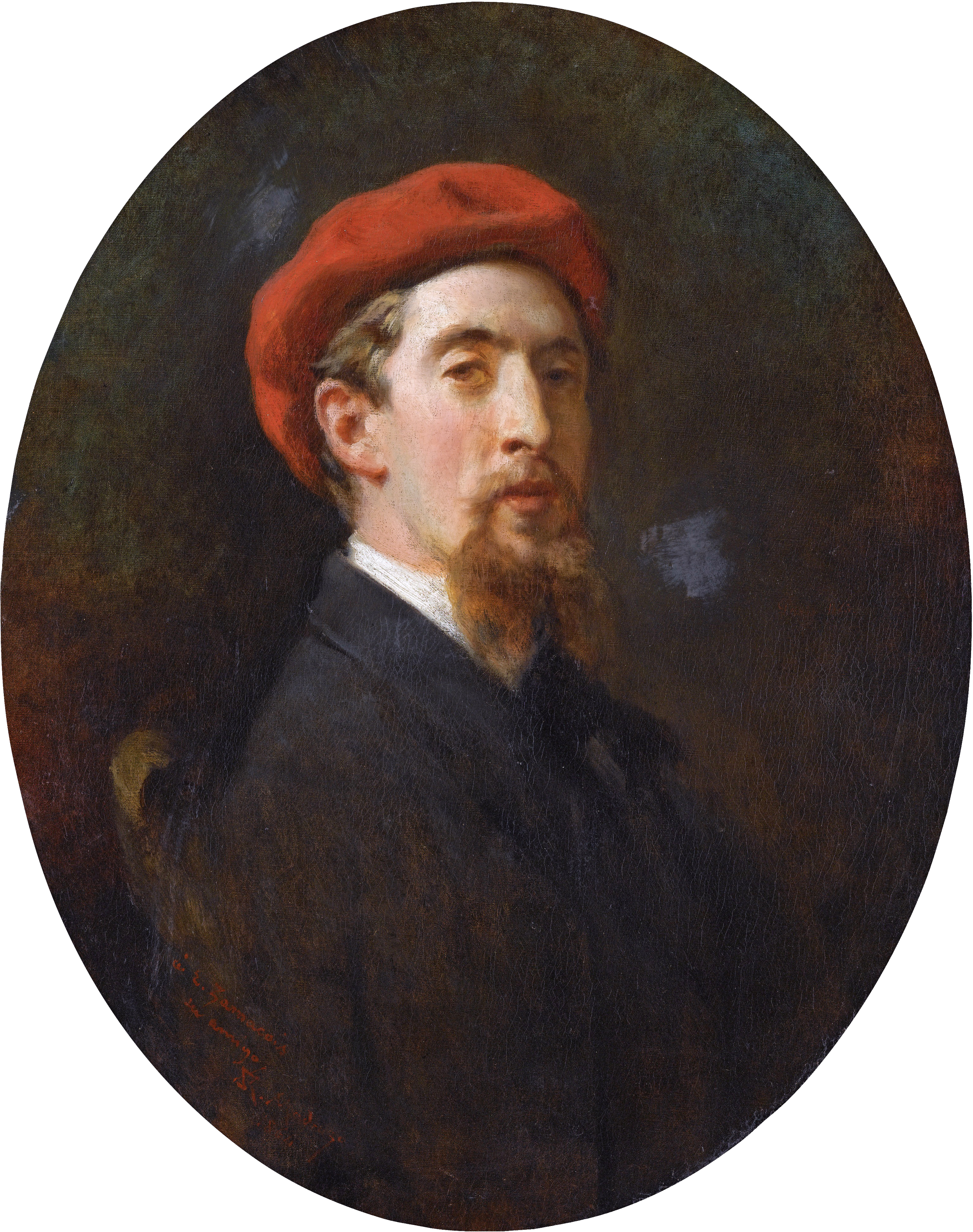 Retrato del pintor español Eduardo Zamacois y Zabala (1841-1871). Esta obra fue adquirida en el año 2011 por el Museo del Prado.